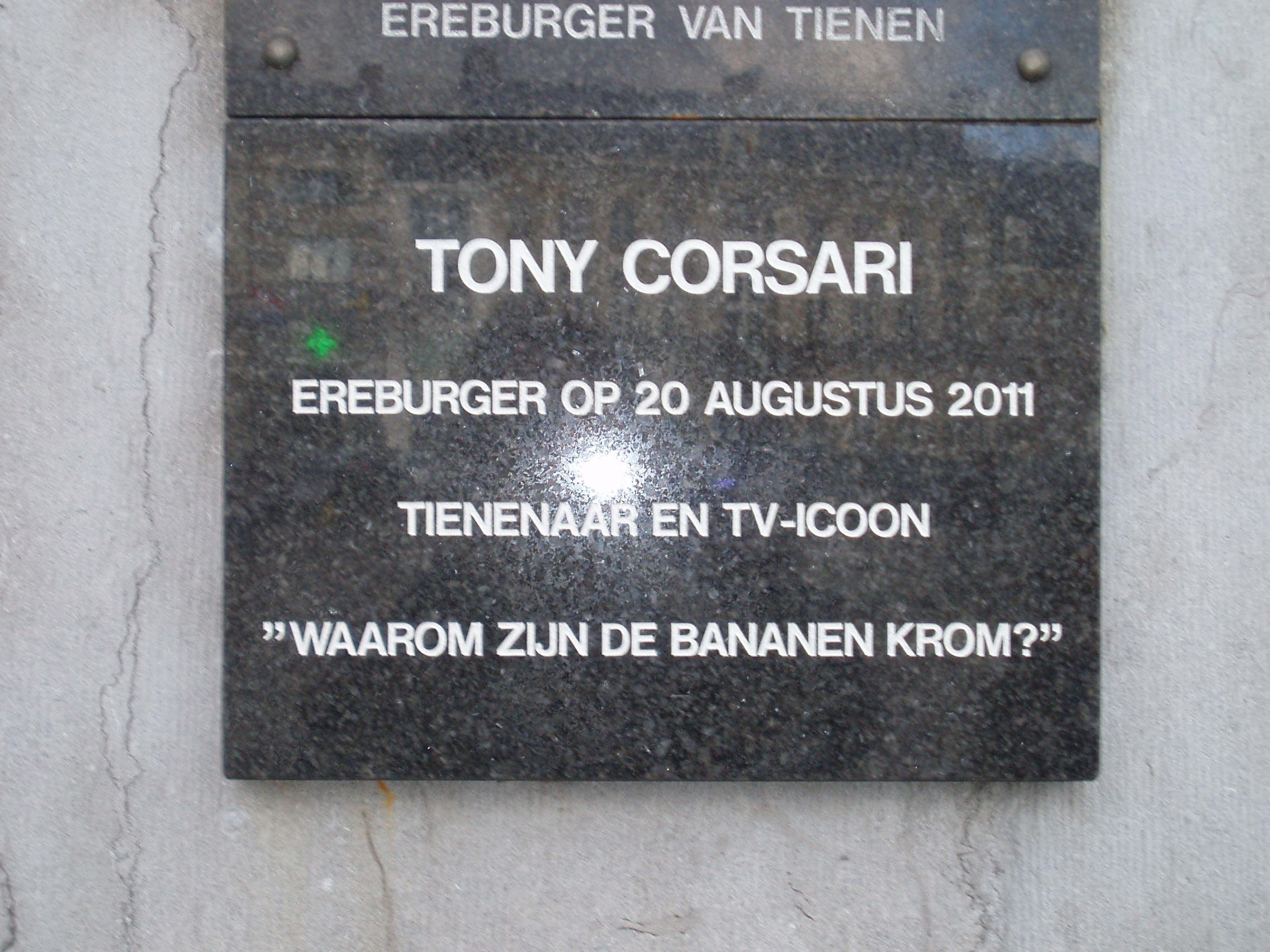 Herdenkingsplaat Tony Corsari aan het stadhuis